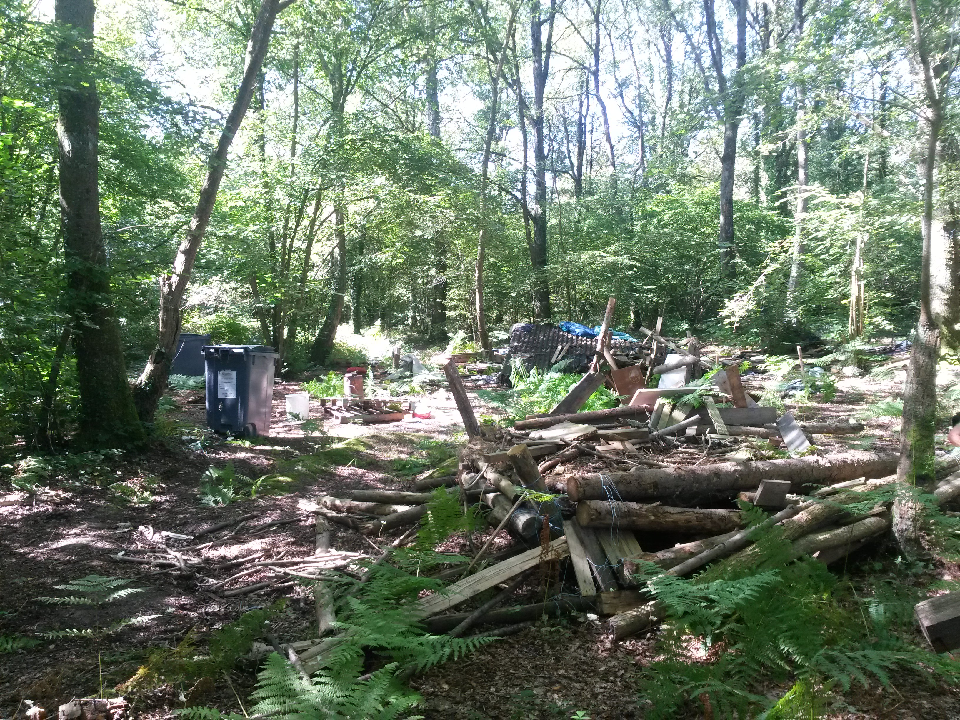 Reste d'une cabane détruite par la police lors des évacuations du printemps 2018